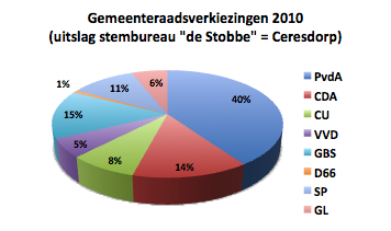 Ceresdorp gemeenteraadsverkiezingen 2010 - uitslag stembureau 15